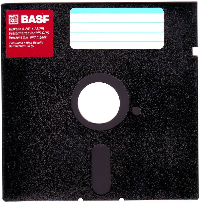 Disco flexible de 5.25 pulgadas